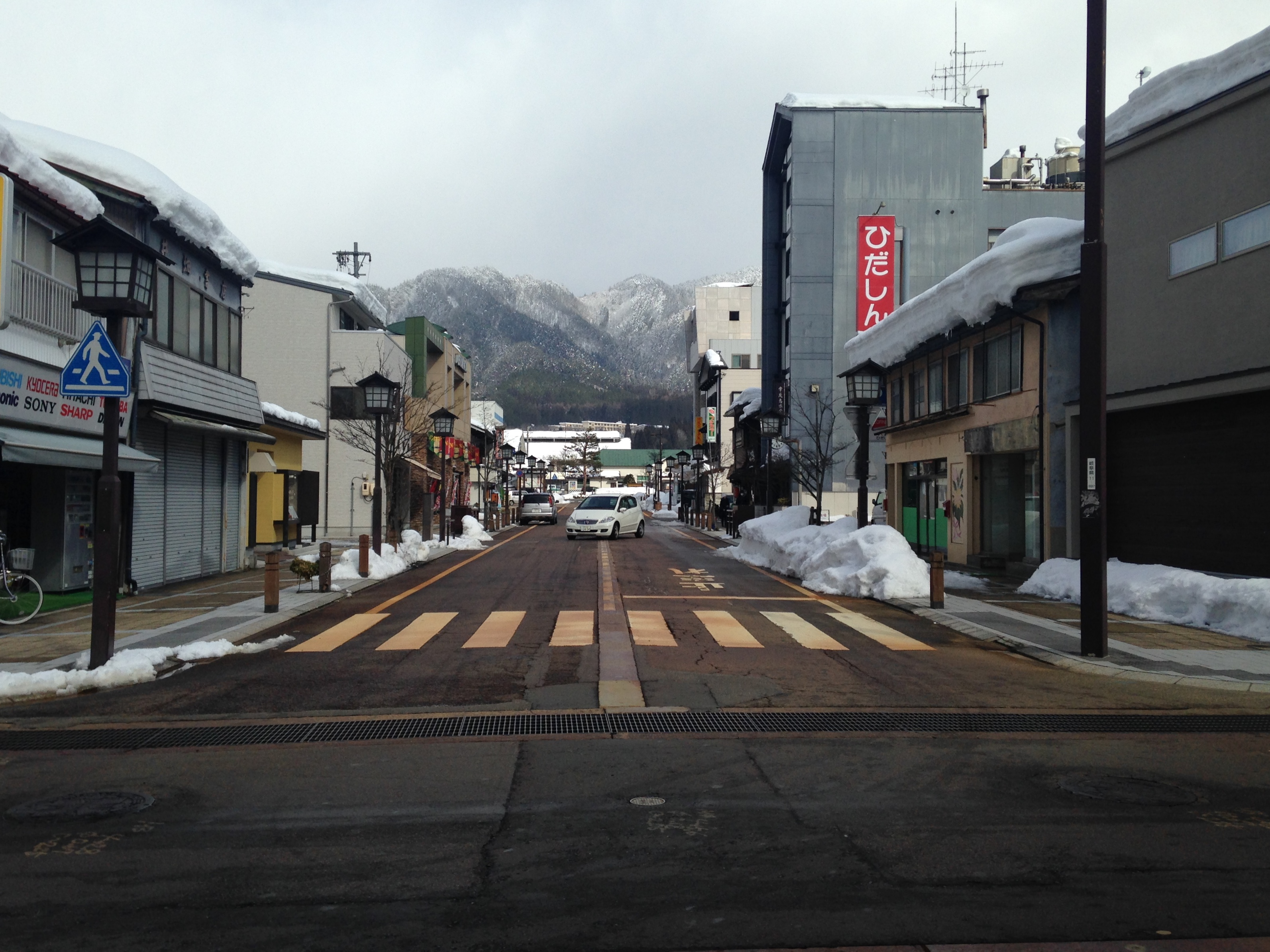 南側より望む飛騨古川駅